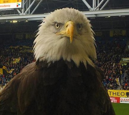 Adelaar Hertog